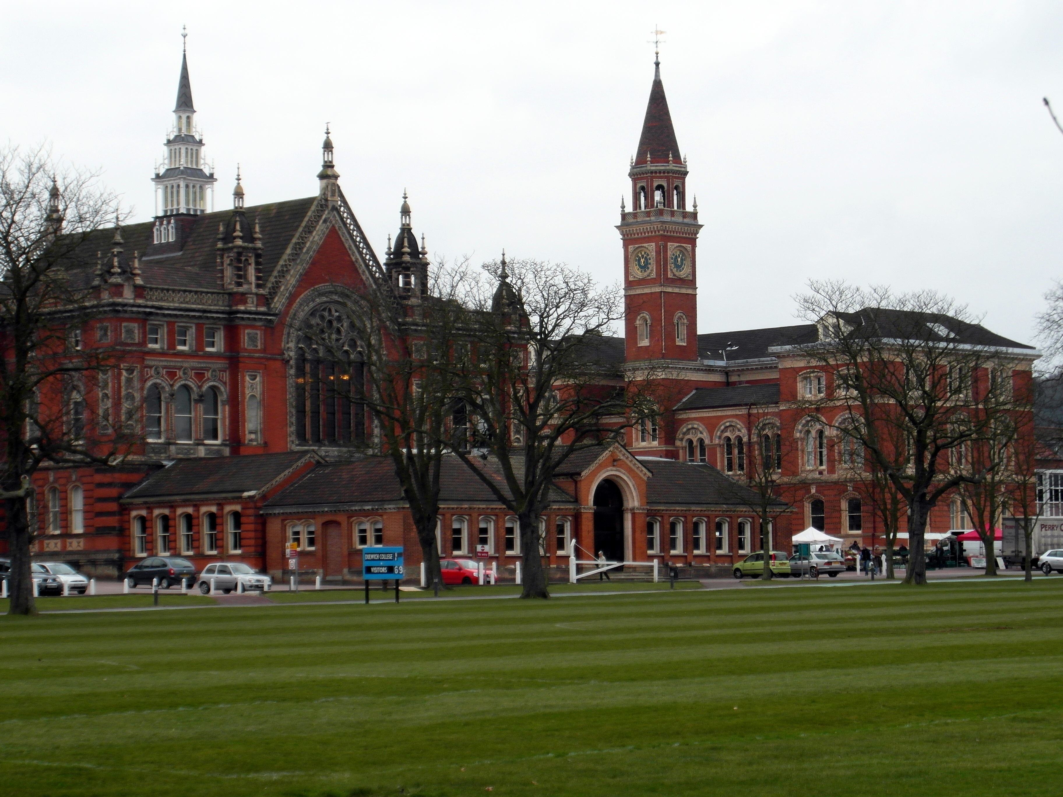 Dulwich College, where Stephen Finer Attended. Dulwich College, where Stephen Finer Attended.